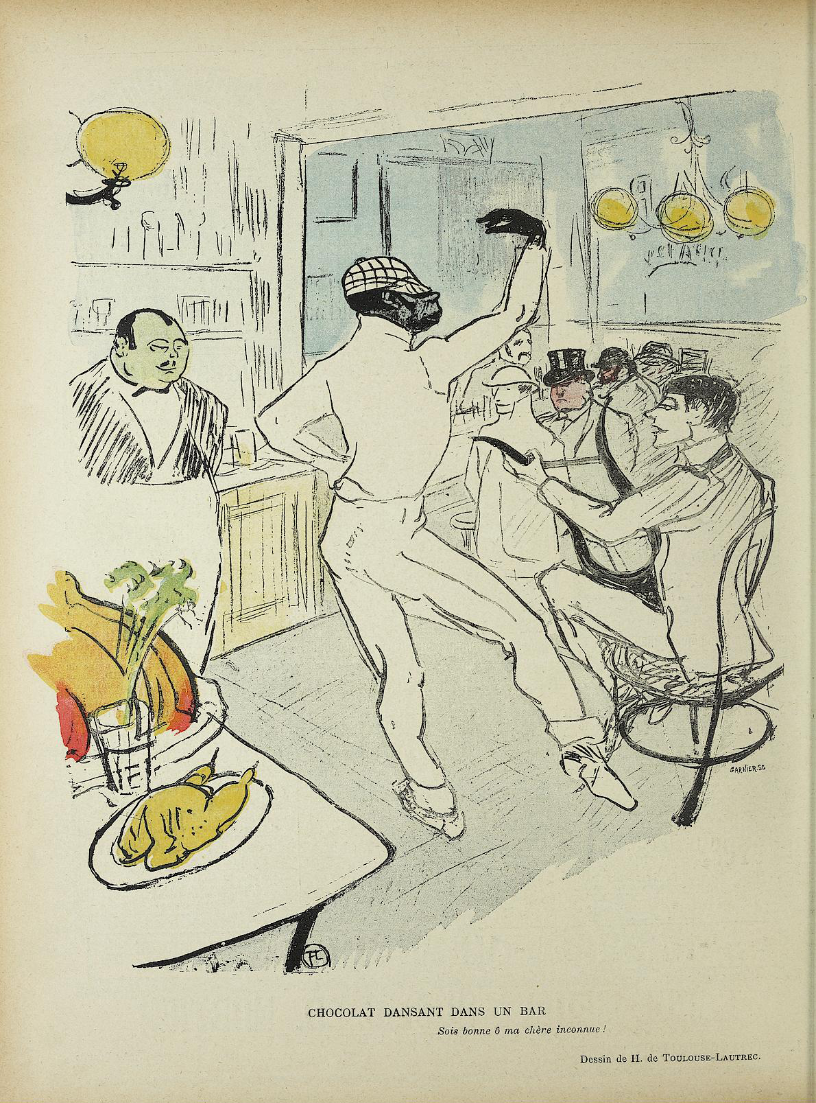 Caricature in Le Rire n°73